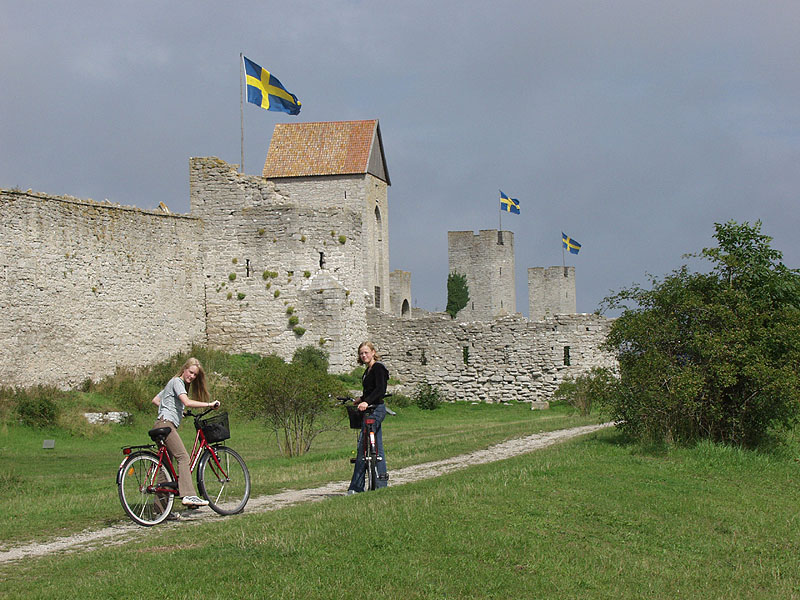 Stadtmauer von Visby auf Gotland (Schweden)